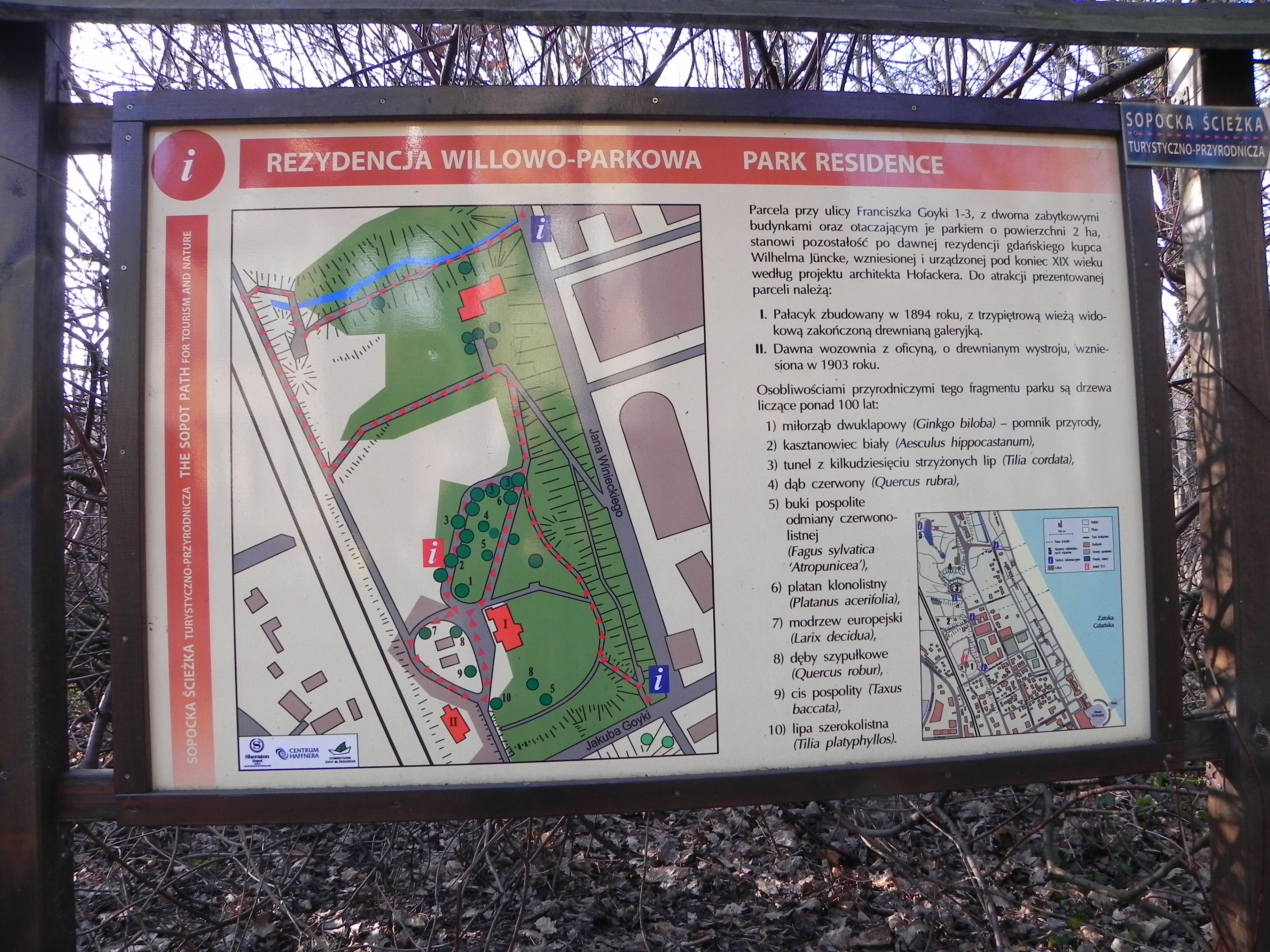 Sopot, park (ogród), XIX